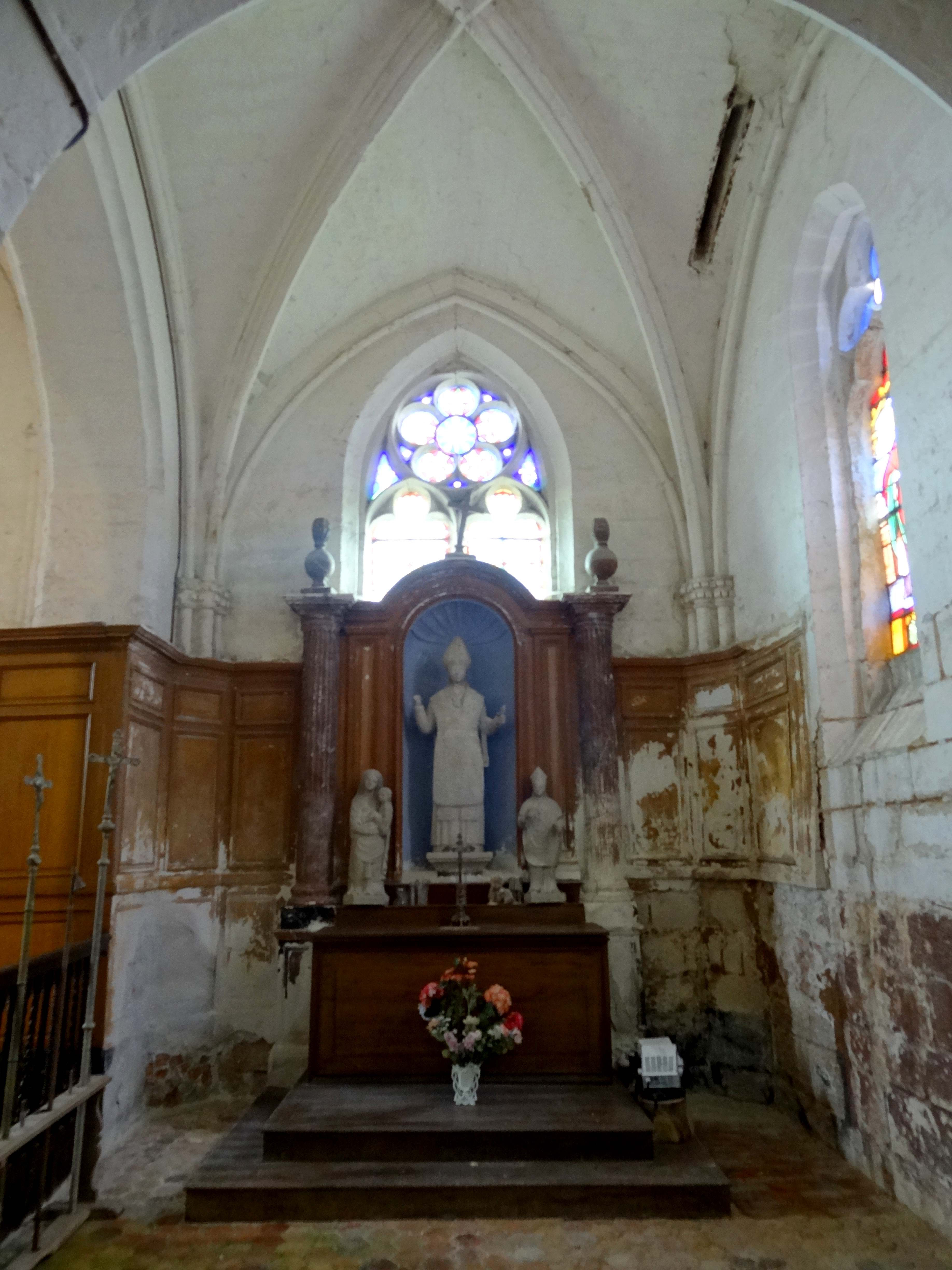 Intérieur de l'église - voir titre.